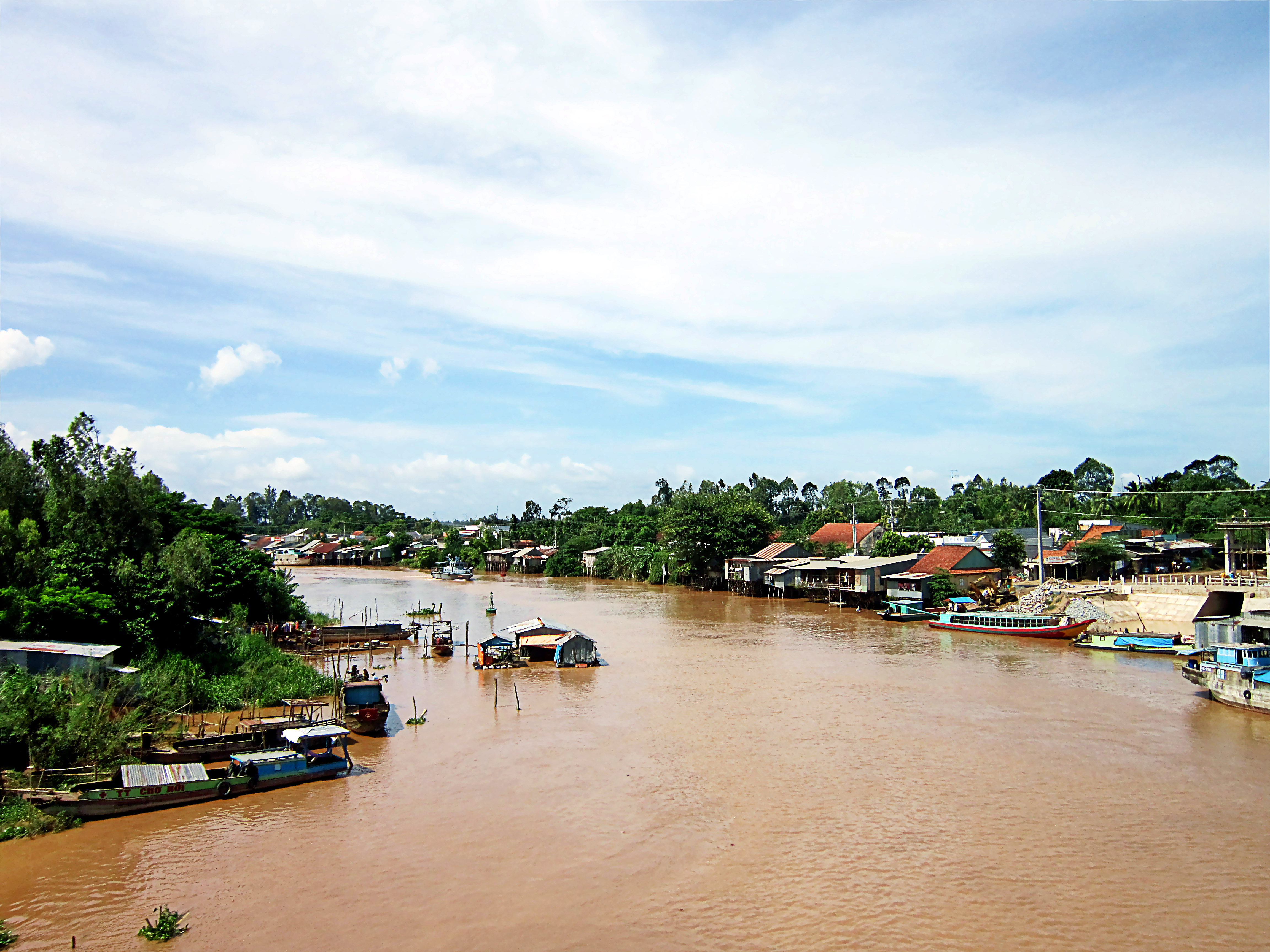 Rạch Ông Chưởng, đoạn chảy qua xã Kiến An; thuộc huyện Chợ Mới, tỉnh An Giang, Việt Nam.